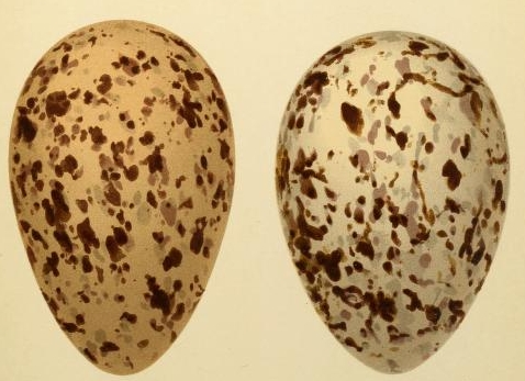 Ichthyaetus ichthyaetus eggs